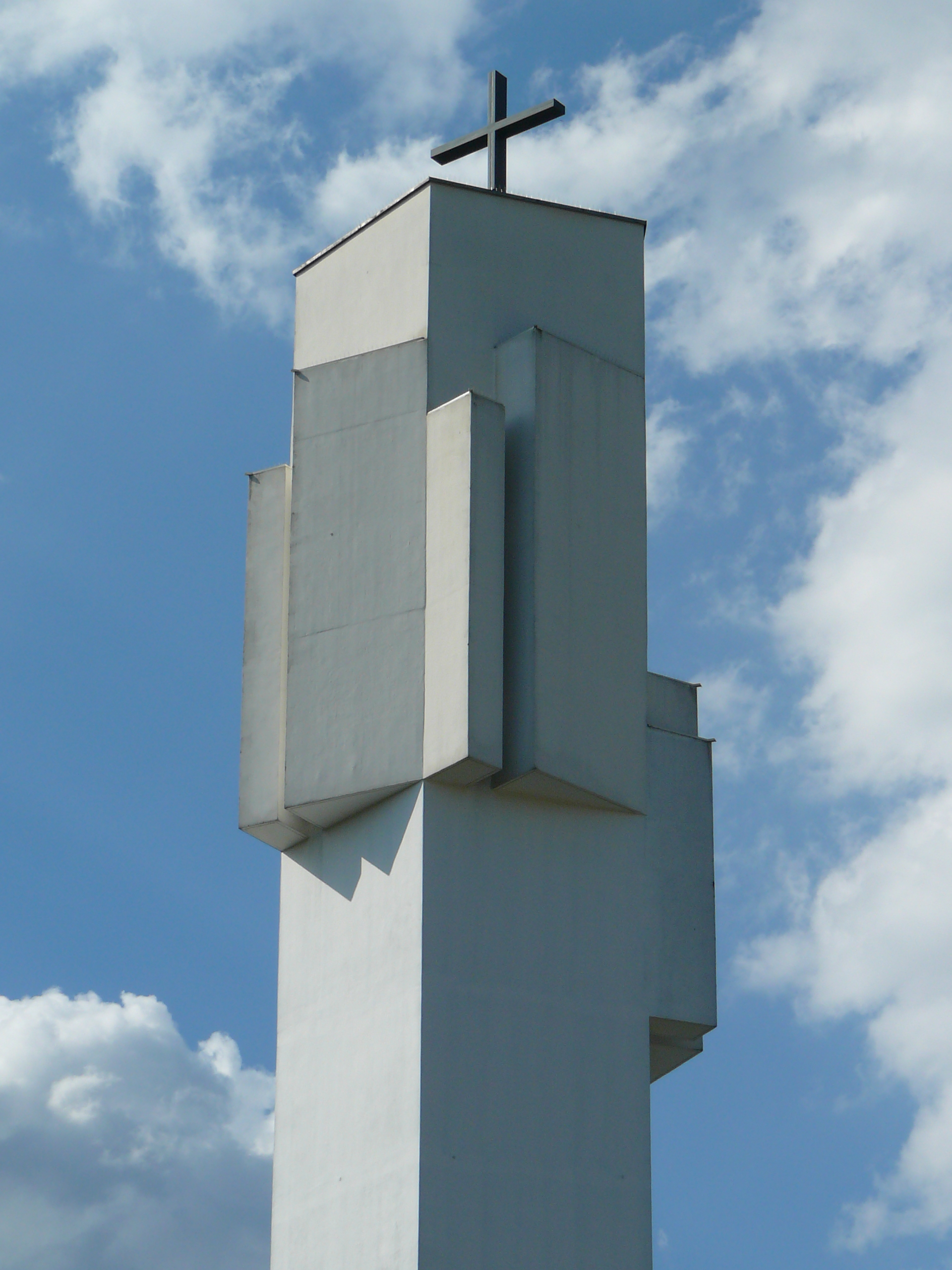 Römisch-katholische Pfarrkirche St. Michael Zollikerberg, Glockenstube